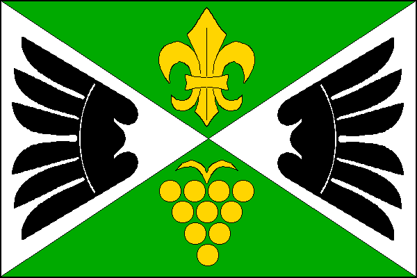 vlajka, Lechovice, okres Znojmo